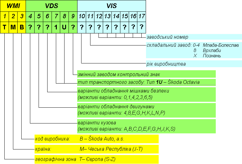 Інформація про виробника, про варіанти автомобіля Škoda Octavia (тип 1U) та про складальний завод, де було завершено складання автомобіля